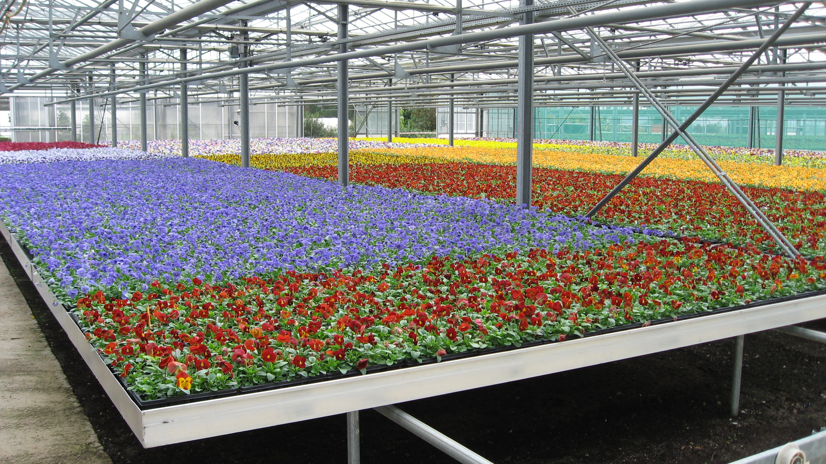 Viola sp. in Centre Horticole de la Ville de Paris